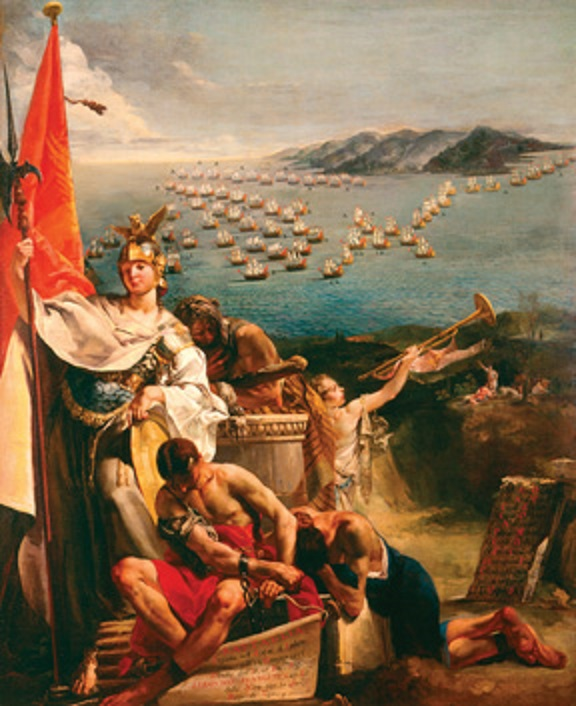 A Batalha de Imbros, entre a Armata grossa de Veneza e a armada turca, a 12-16 de Junho de 1717. Foi durante esta batalha que o almirante veneziano Flangini foi mortalmente ferido. Um mês mais tarde, a 19 de Julho, travou-se a Batalha de Matapão.